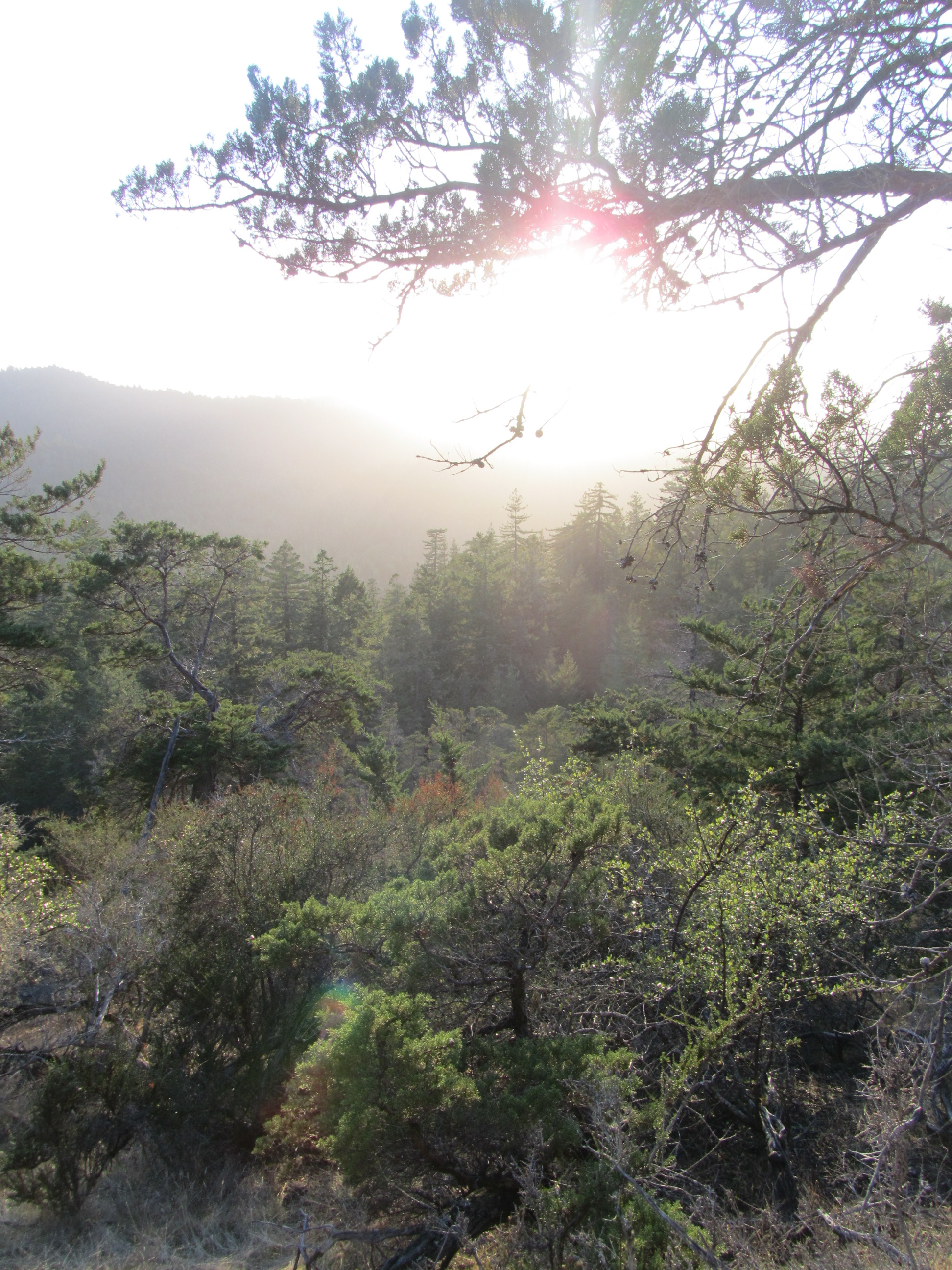 Cupressus abramsiana at Butano Ridge